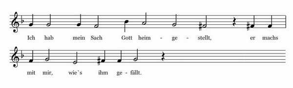 Anfang der Noten von Johann Leon: "Ich hab mein Sach Gott heimgestellt" von 1589 nach dem evangelischen Kirchengesangbuch, Ausgabe für Niedersachsen, 1962 (Nr. 315)